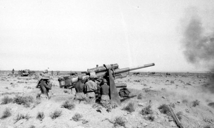 18.6.1942 Rommel gibt 8,8 cm Flak Befehl feindl. Panzerspähwagen, die das feindliche Artilleriefeuer leiten, zu bekämpfen